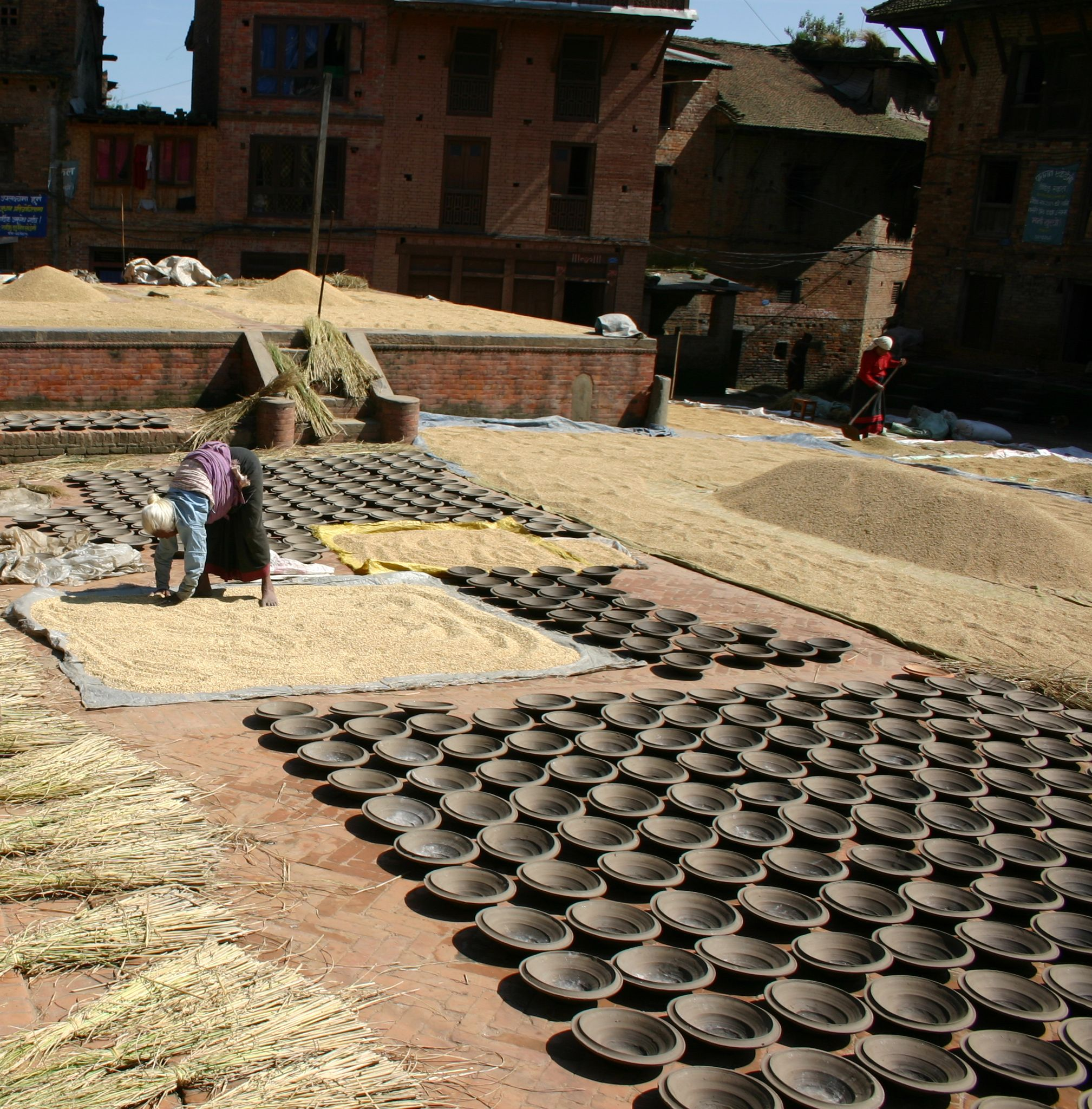 Bhaktapur